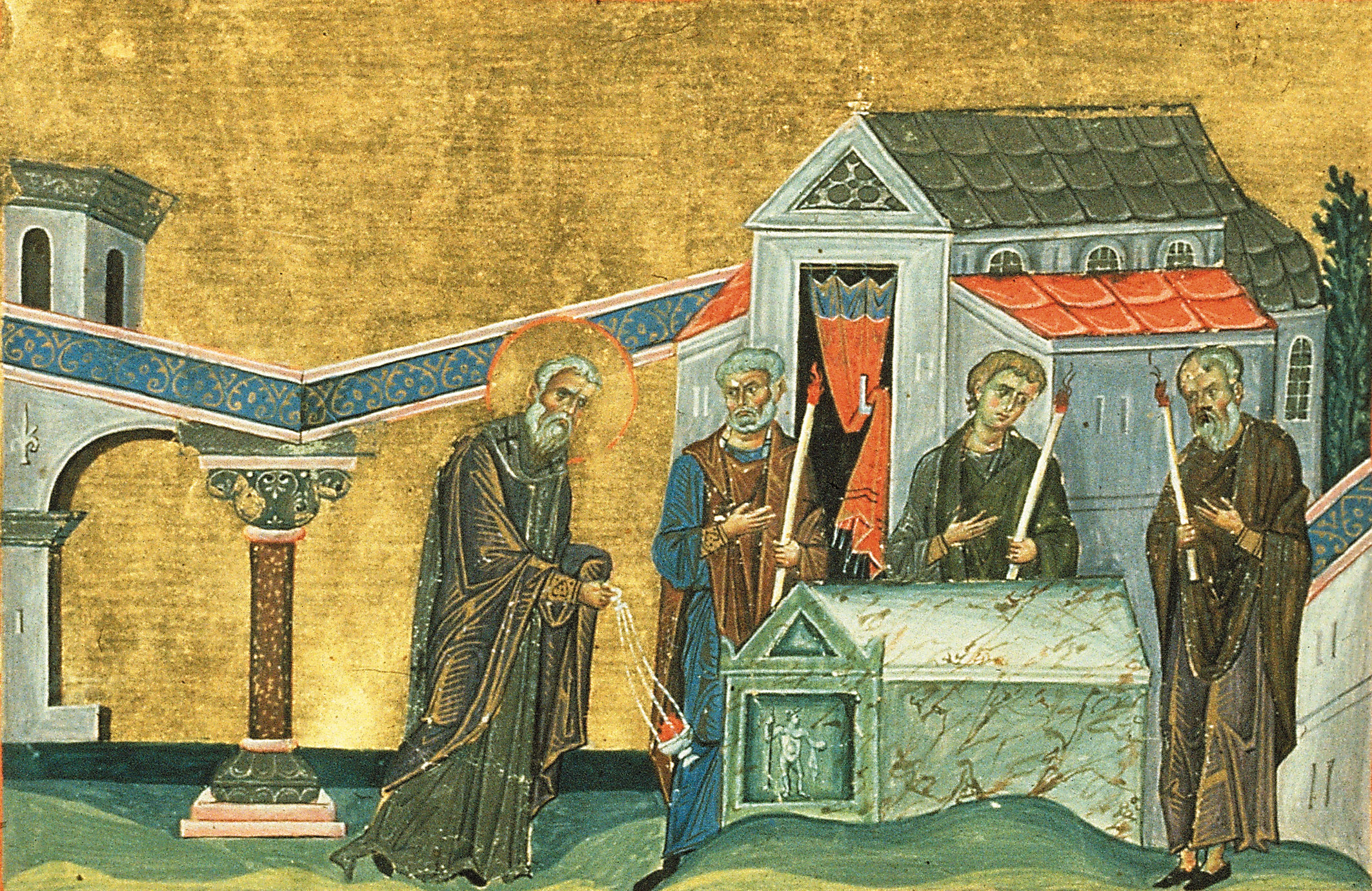 Святитель Маруф Мартиропольский (Тигритский), Месопотамский, епископ Константинополь. 985 г. Миниатюра Минология Василия II. Ватиканская библиотека. Рим.